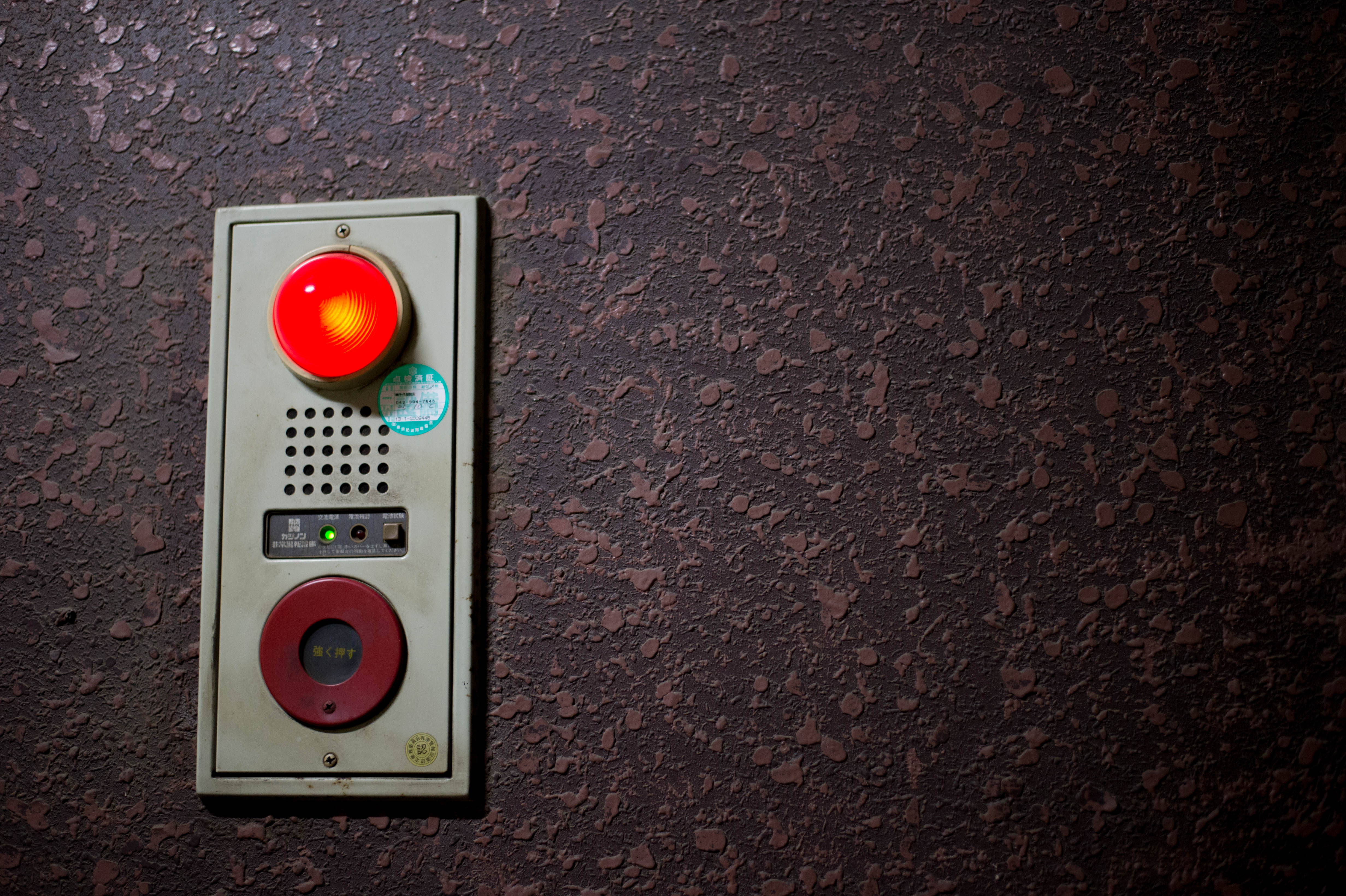 火災報知器